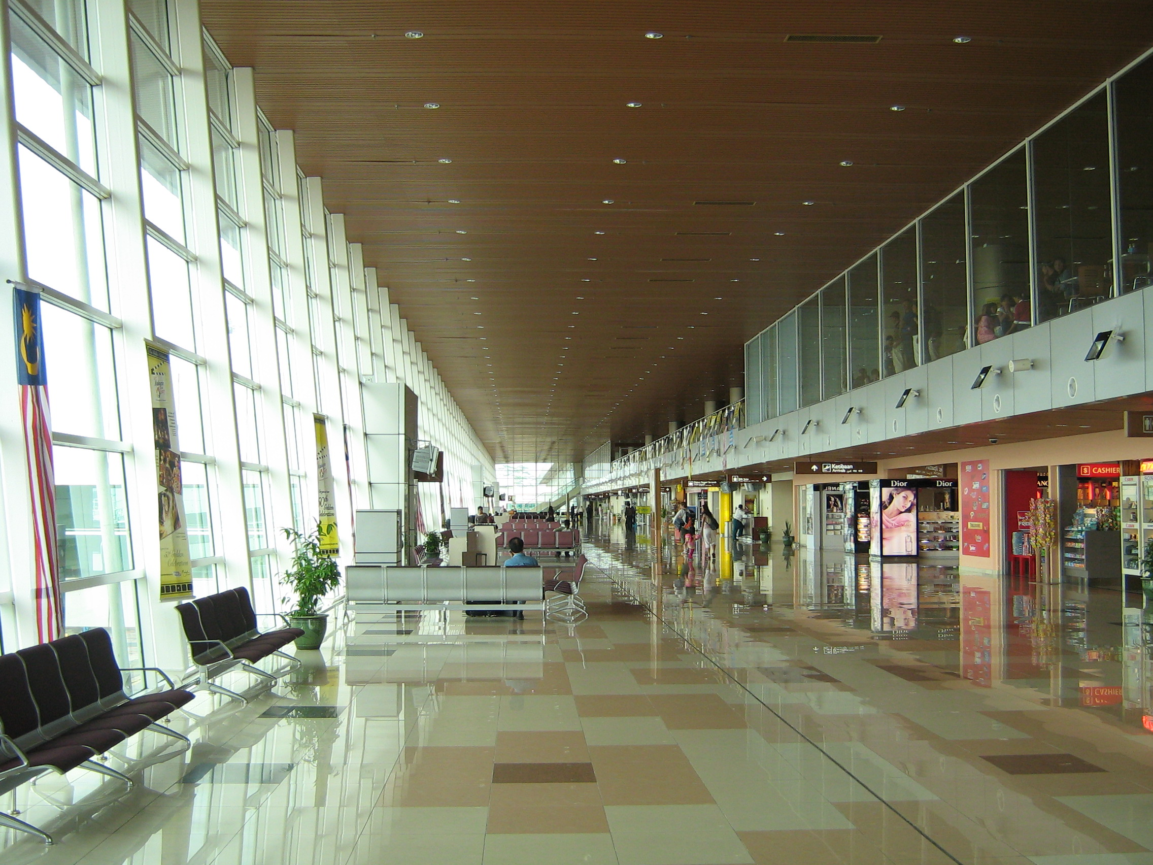 Kuching Airport pier